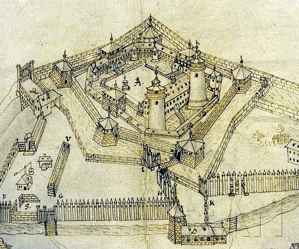 Festung und Ort Lichtenau aus der Vogelschau, Federzeichnung aus der ersten Hälfte 17. Jahrhundert (Staatsarchiv Nürnberg)